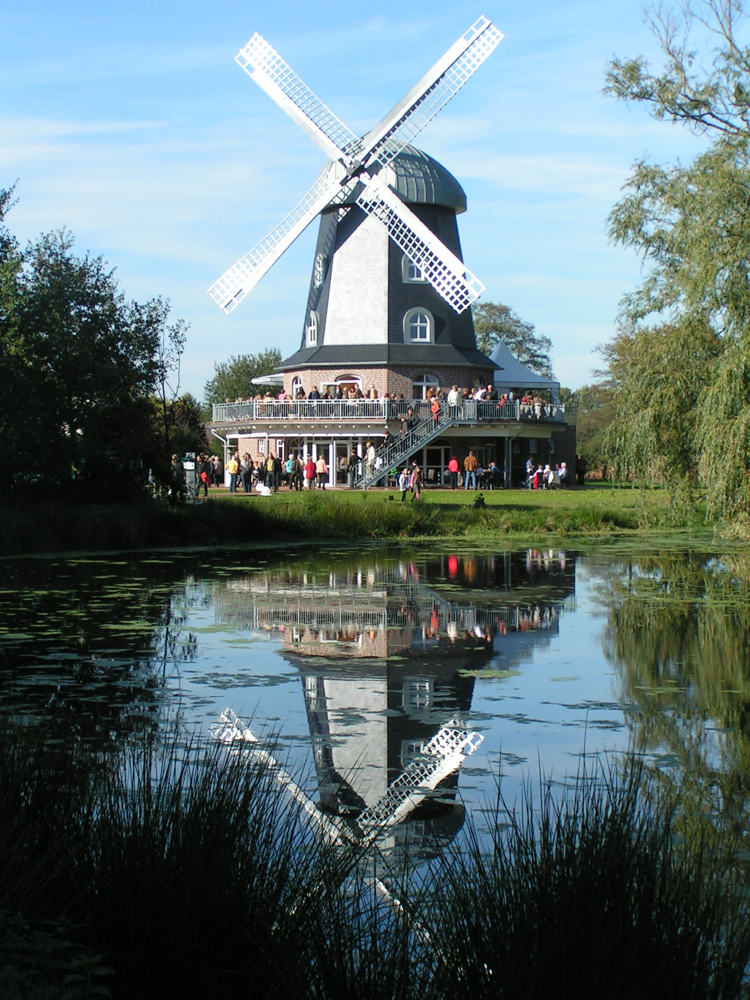 2007 rekonstruierte Spredaer Windmühle (Galerieholländer), genutzt als Mühlencafé. Station der Niedersächsischen Mühlenstraße